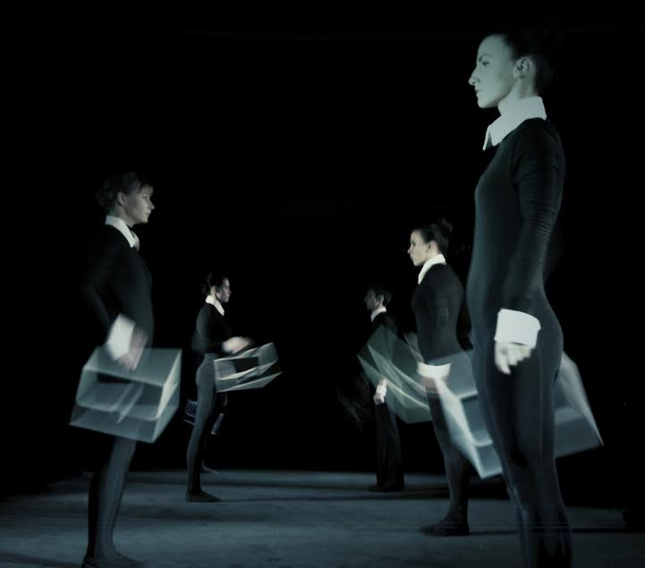 вистава Театру пластичної драми "Історії великого міста"